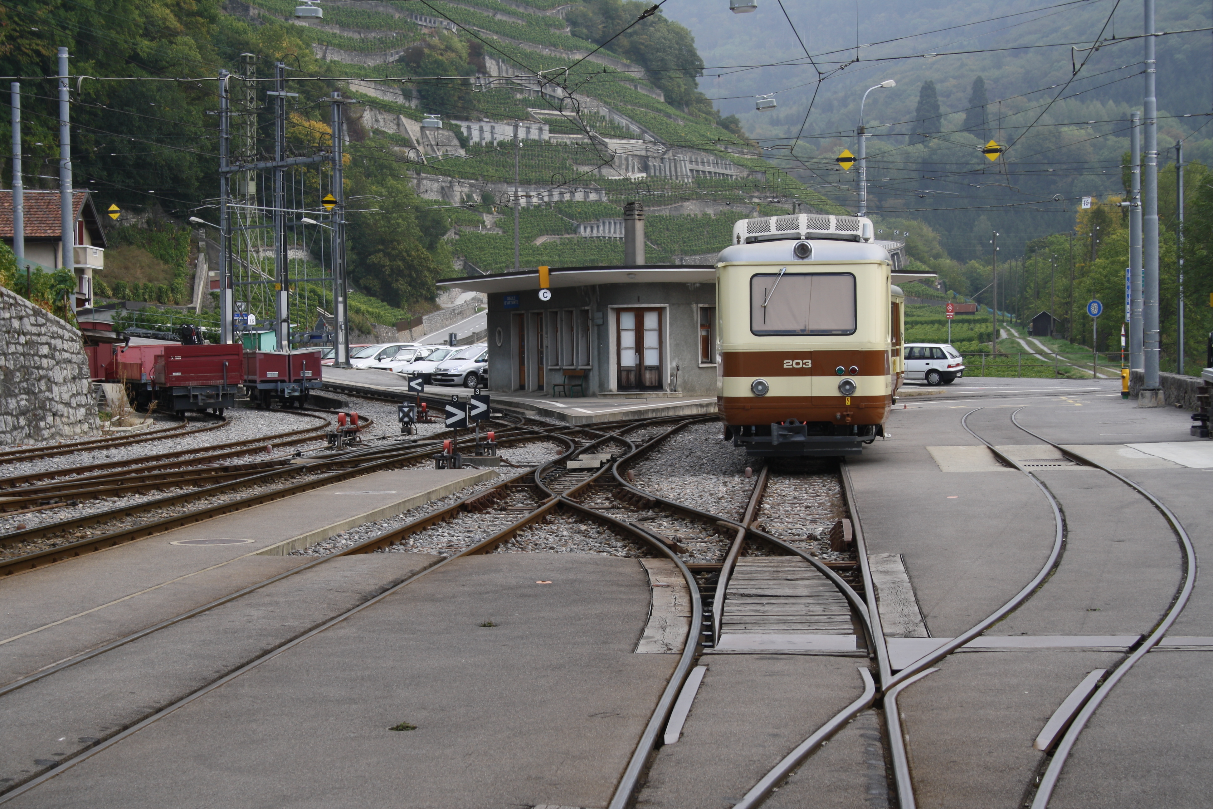 Aigle-Dépôt AL